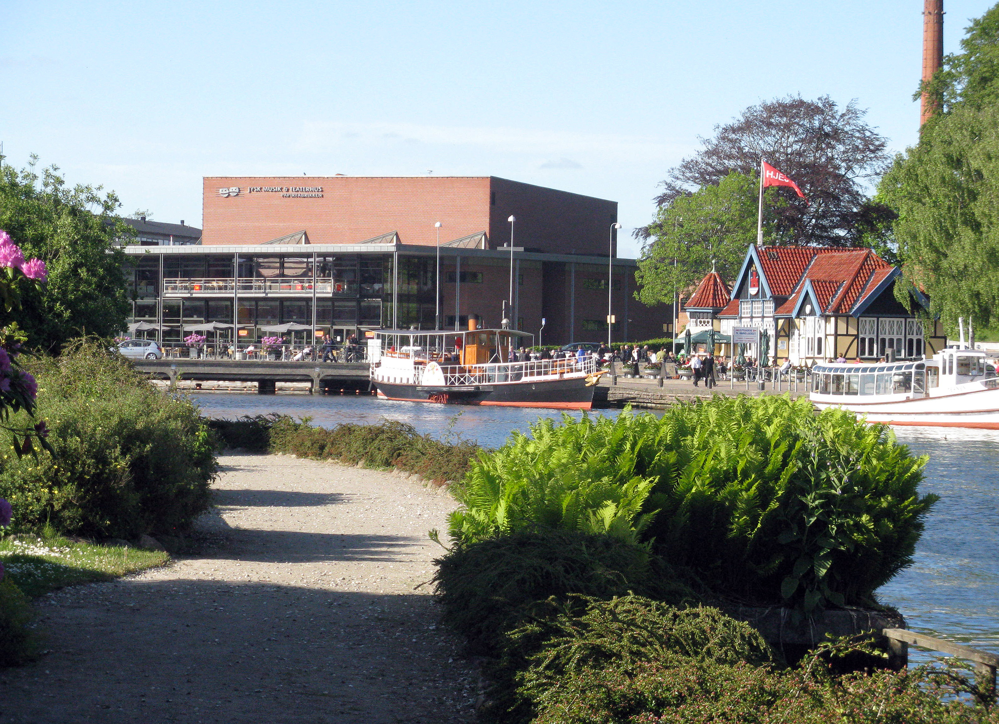 Silkeborg Havn ved Remstrup Å, med Hjejlebådene, Hjejlekiosken og Teater og Musikhuset. en: The harbour of Silkeborg